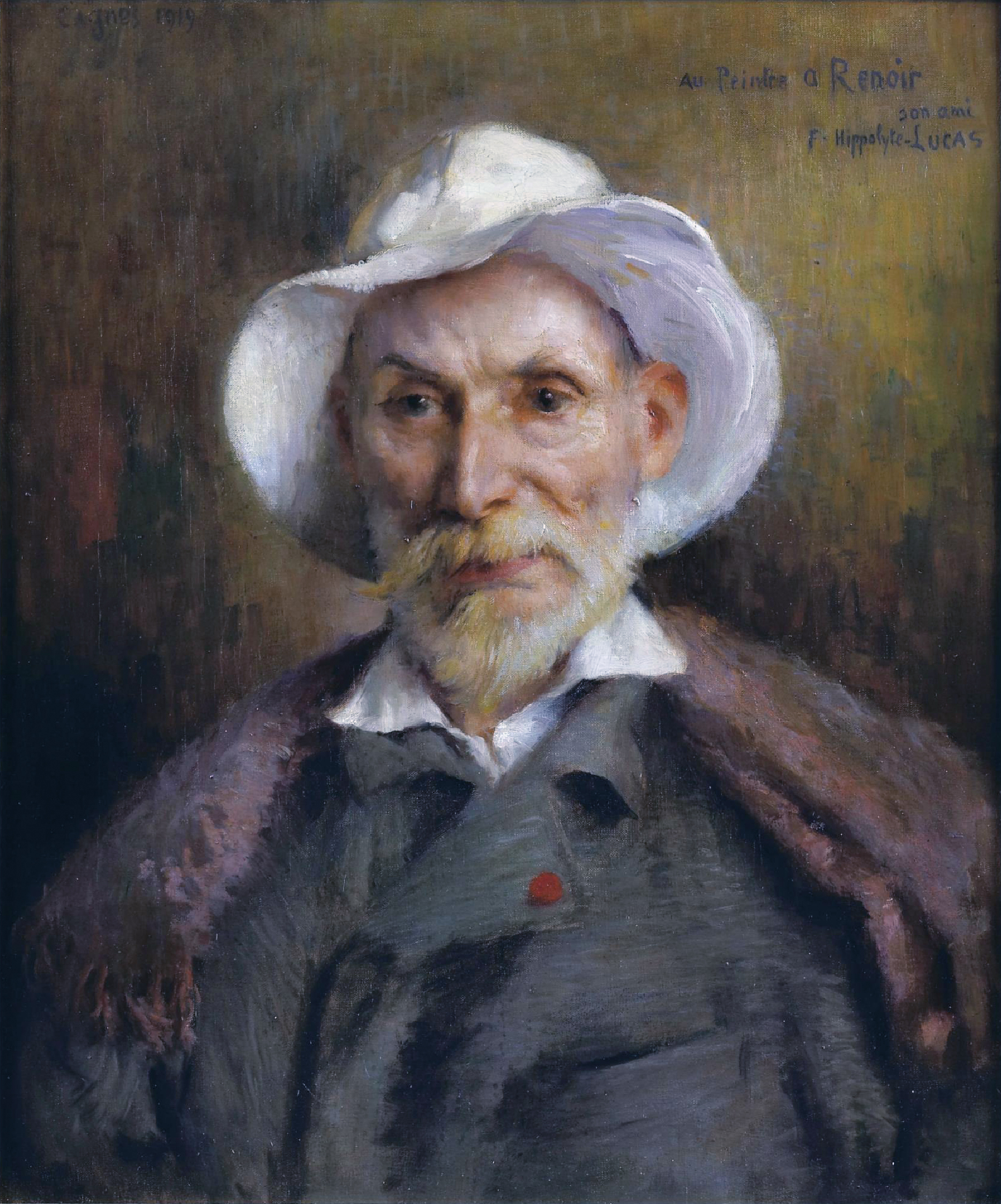 Portrait de Pierre-Auguste Renoir peint à Cagnes-sur-Mer (où vivait Renoir) par Marie-Félix Hippolyte-Lucas